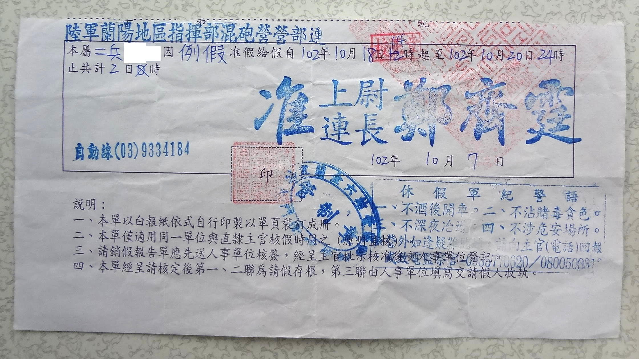 中華民國陸軍蘭陽地區指揮部混砲營營部連請假單請假人收執聯，請假時間由請假人自行填寫。